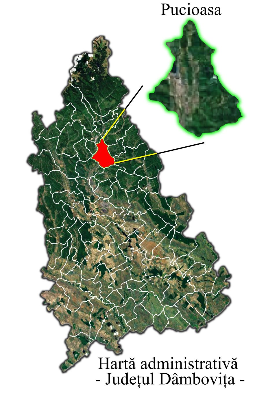 Pucioasa jud Dambovita.